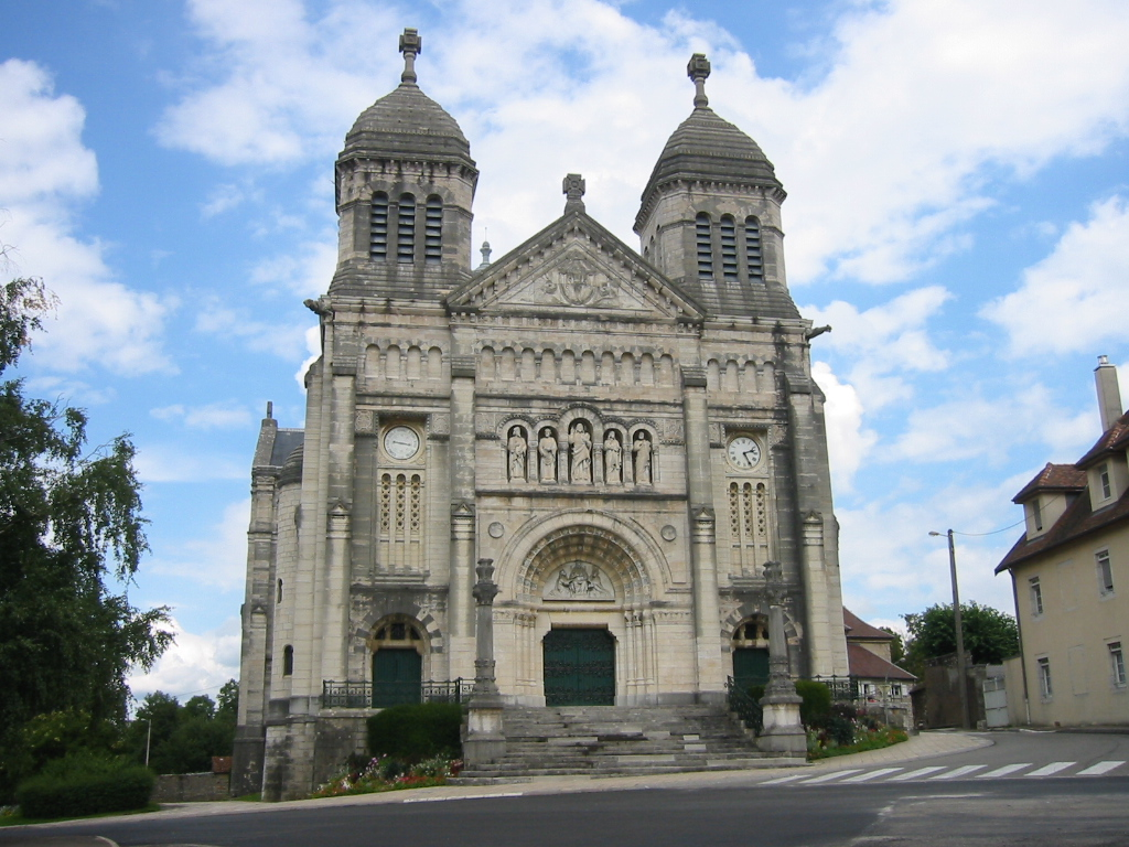 Eglise Saint Fergeux (près de Besançon)